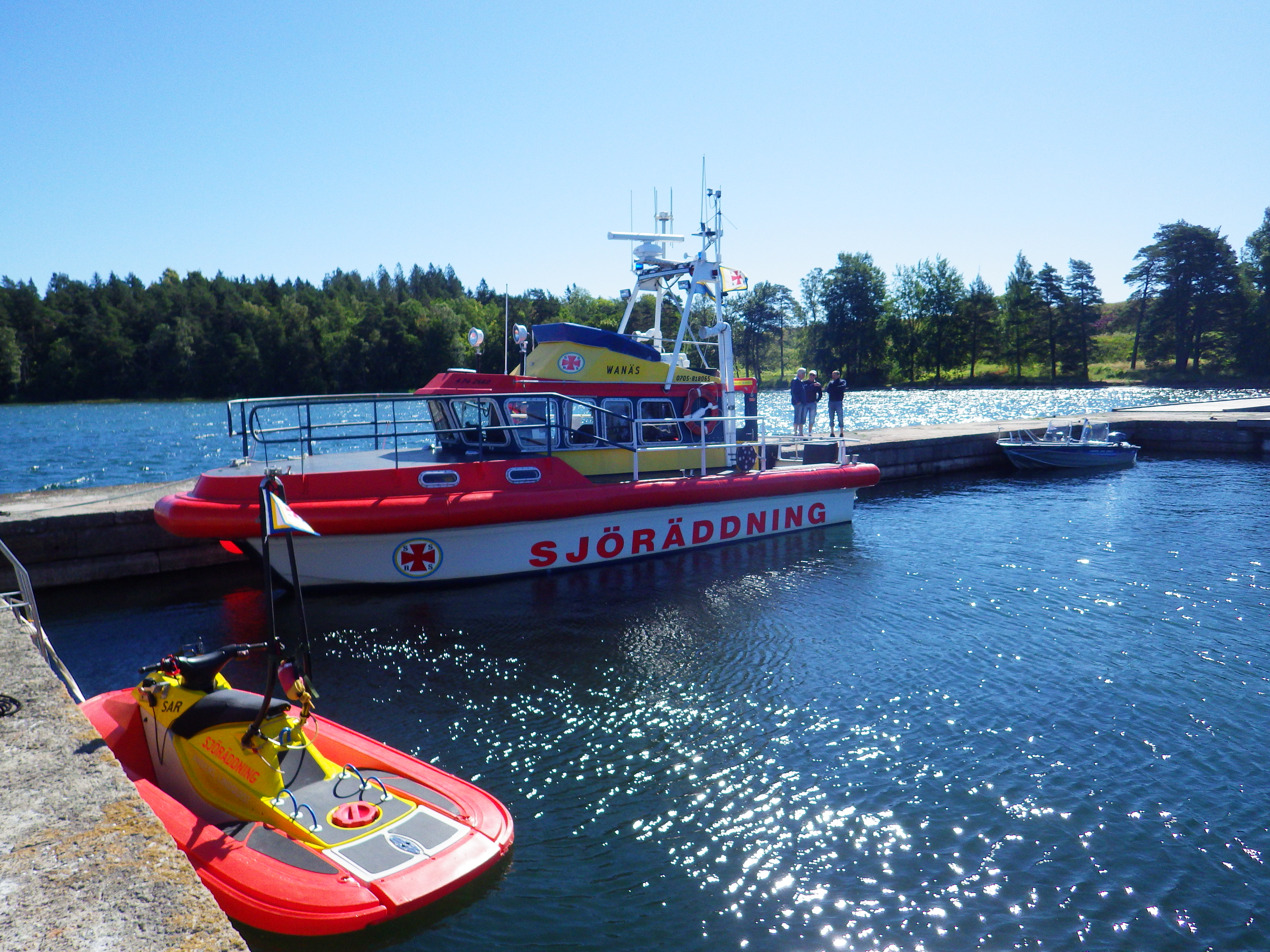 Rescue Wanäs och Rescuerunner Anders Lindquist från SSRS Räddningsstation Karlsborg.